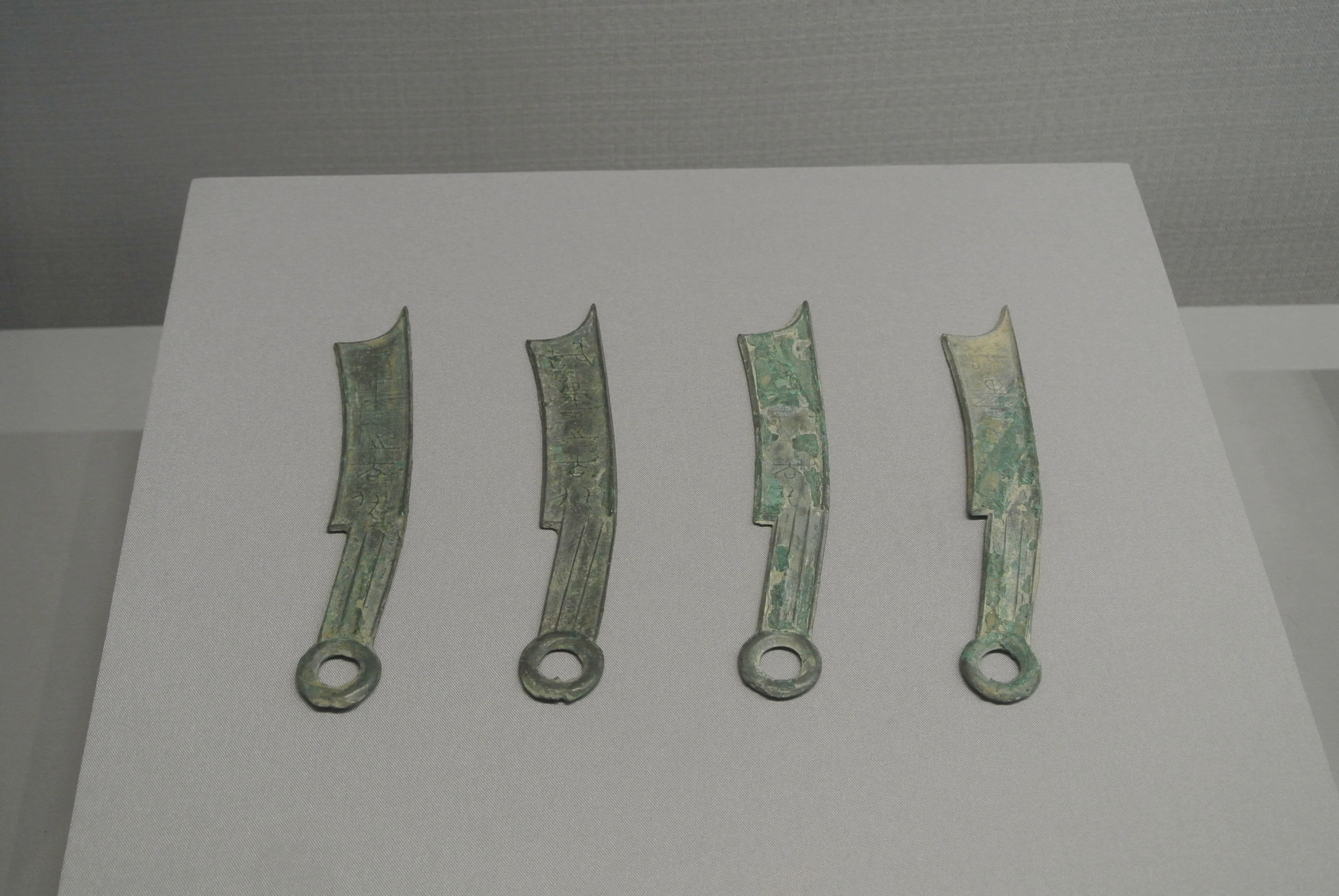 青岛市博物馆所藏即墨之法化刀币